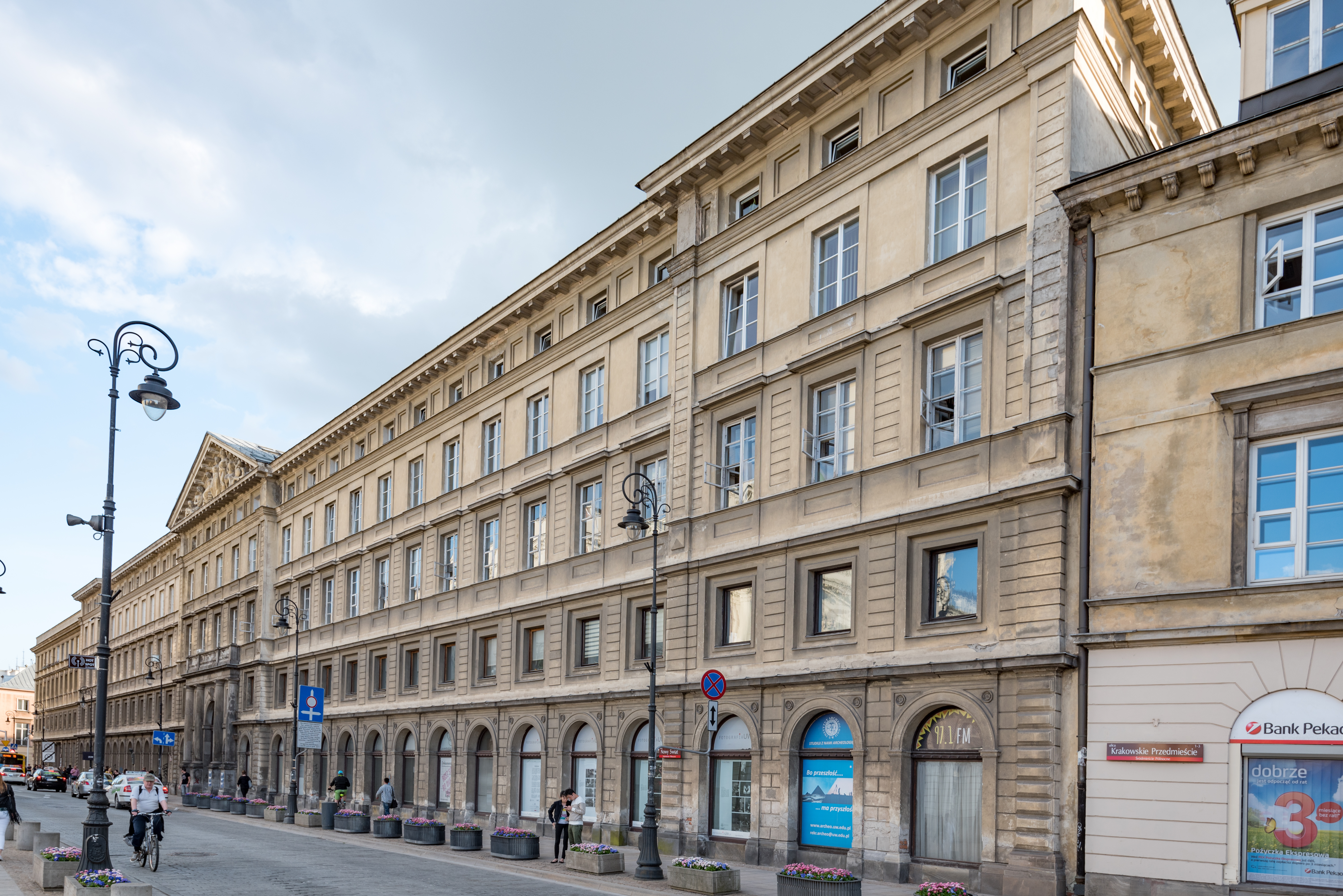 Warszawa, ul. Nowy Świat 67-69